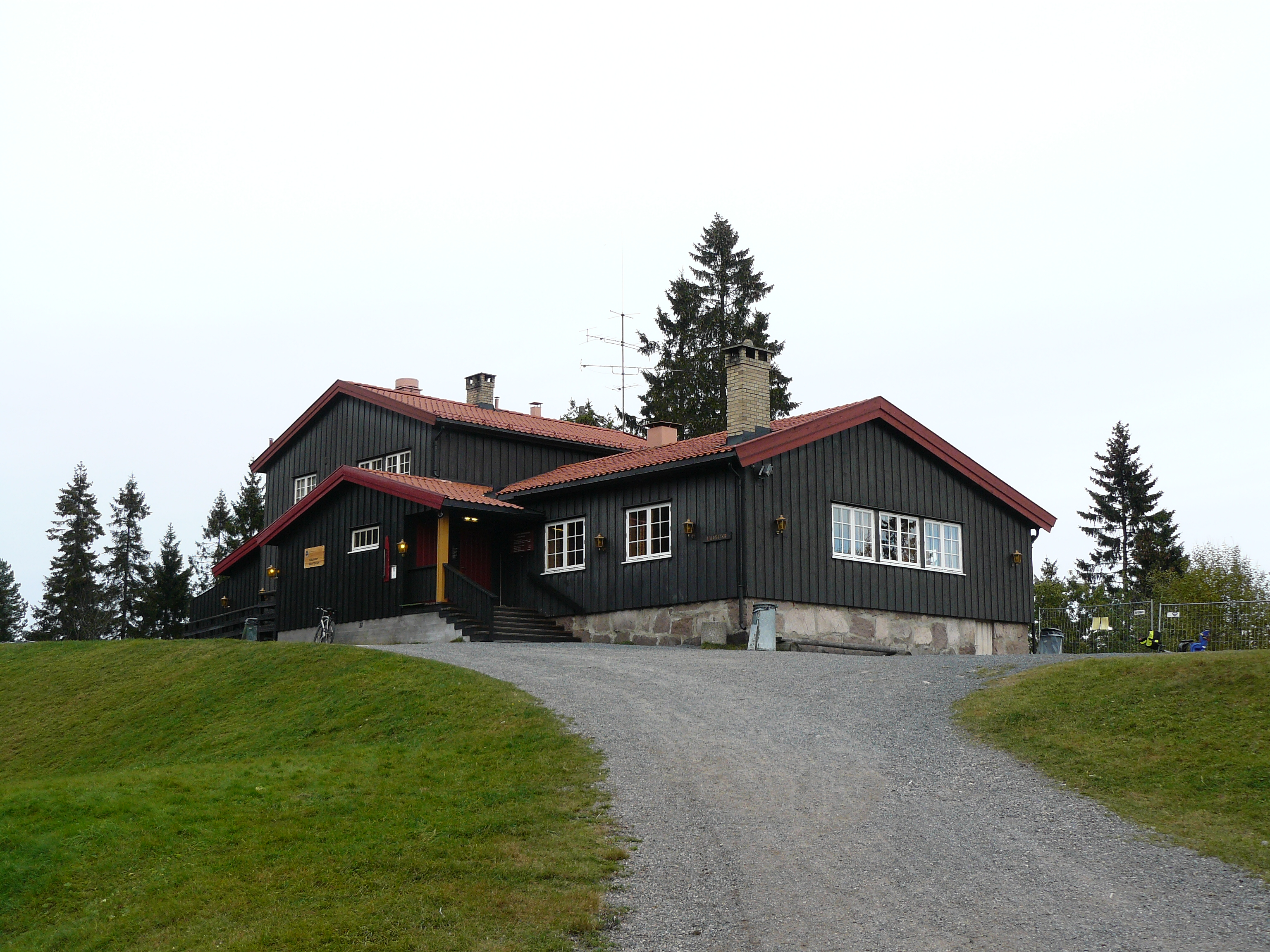 Lilloseter, Lillomarka, Oslo